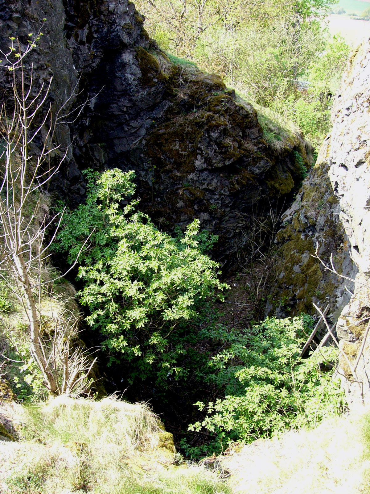 Gesteuinsformation am Kleinen Kulm